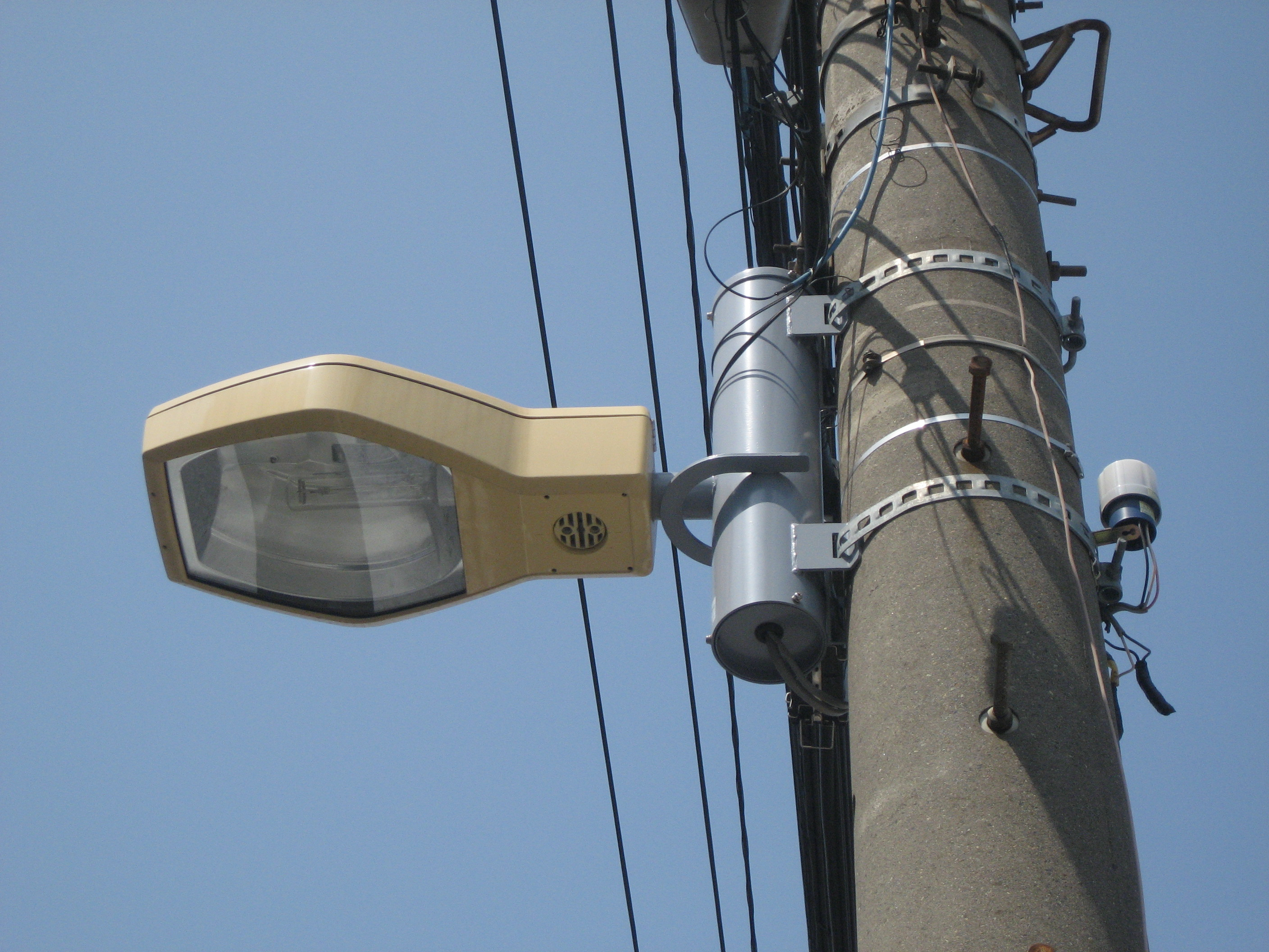 街路灯（電柱共架式）埼玉県